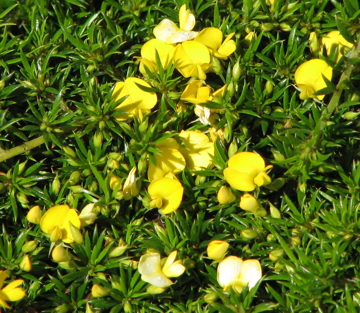 Pultenaea pedunculata , Royal Botanic Gardens, Cranbourne, Victoria, Australia